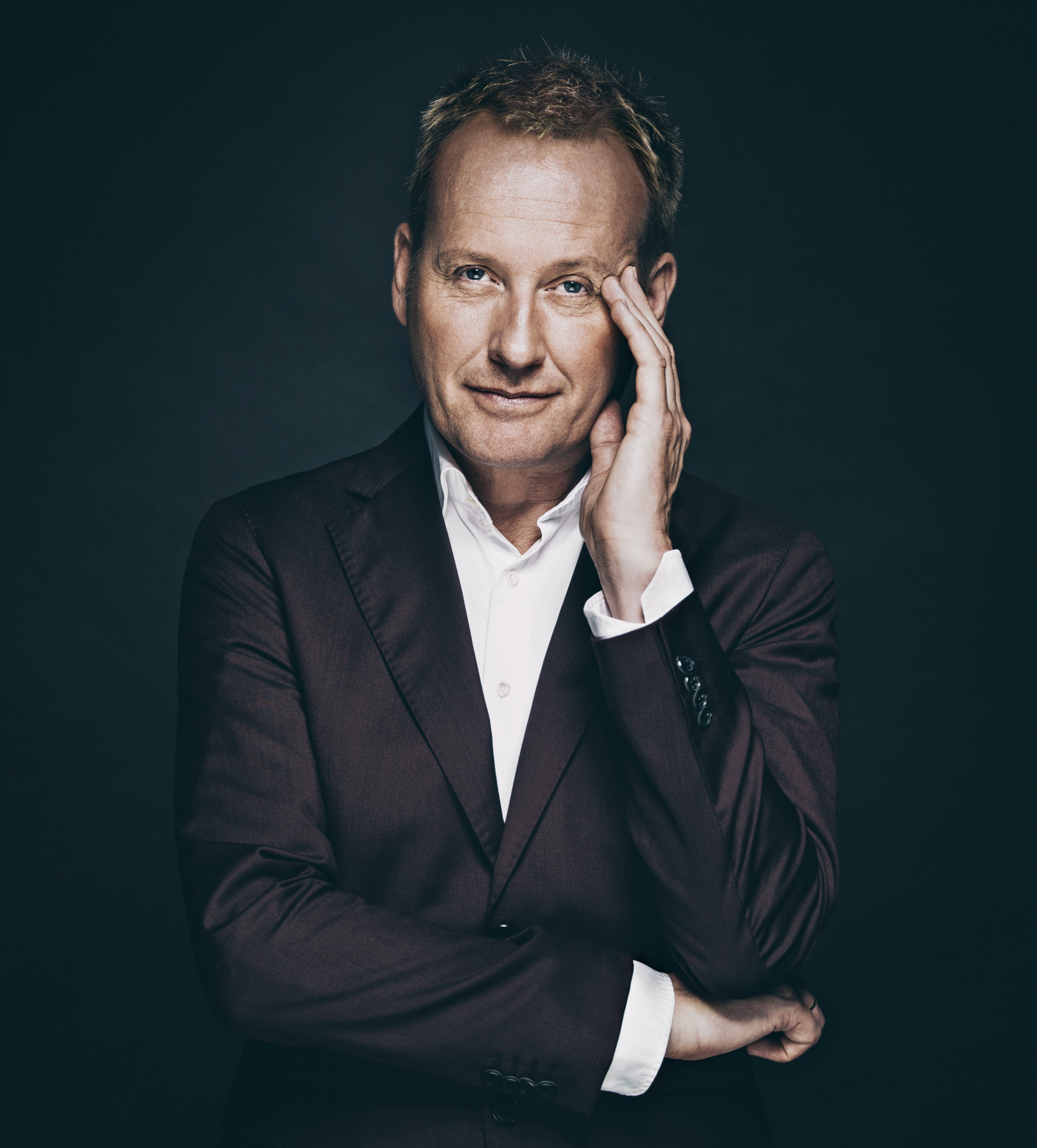 Bilde til artikkelen